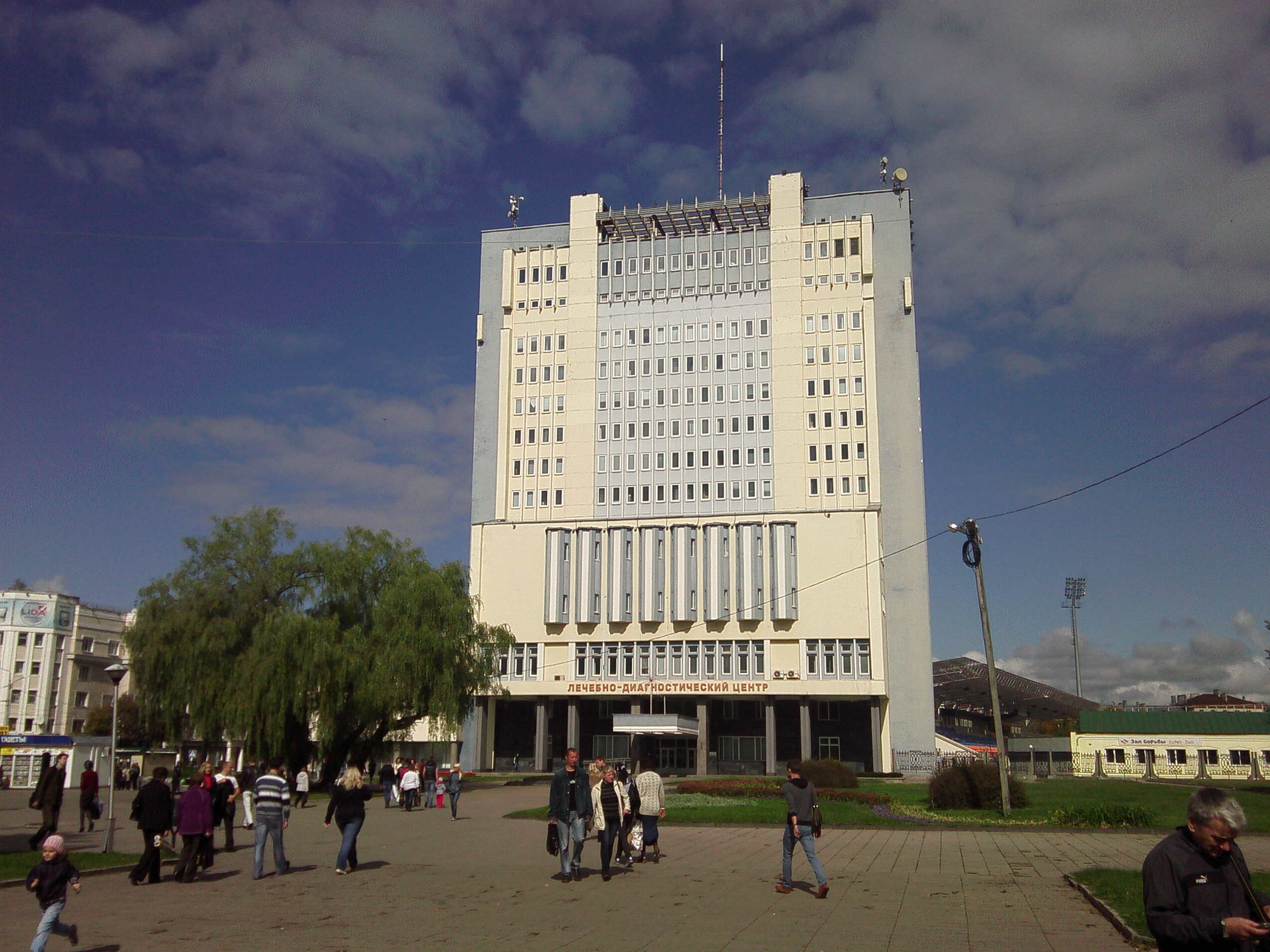 Lieninski District, Mogilev, Belarus